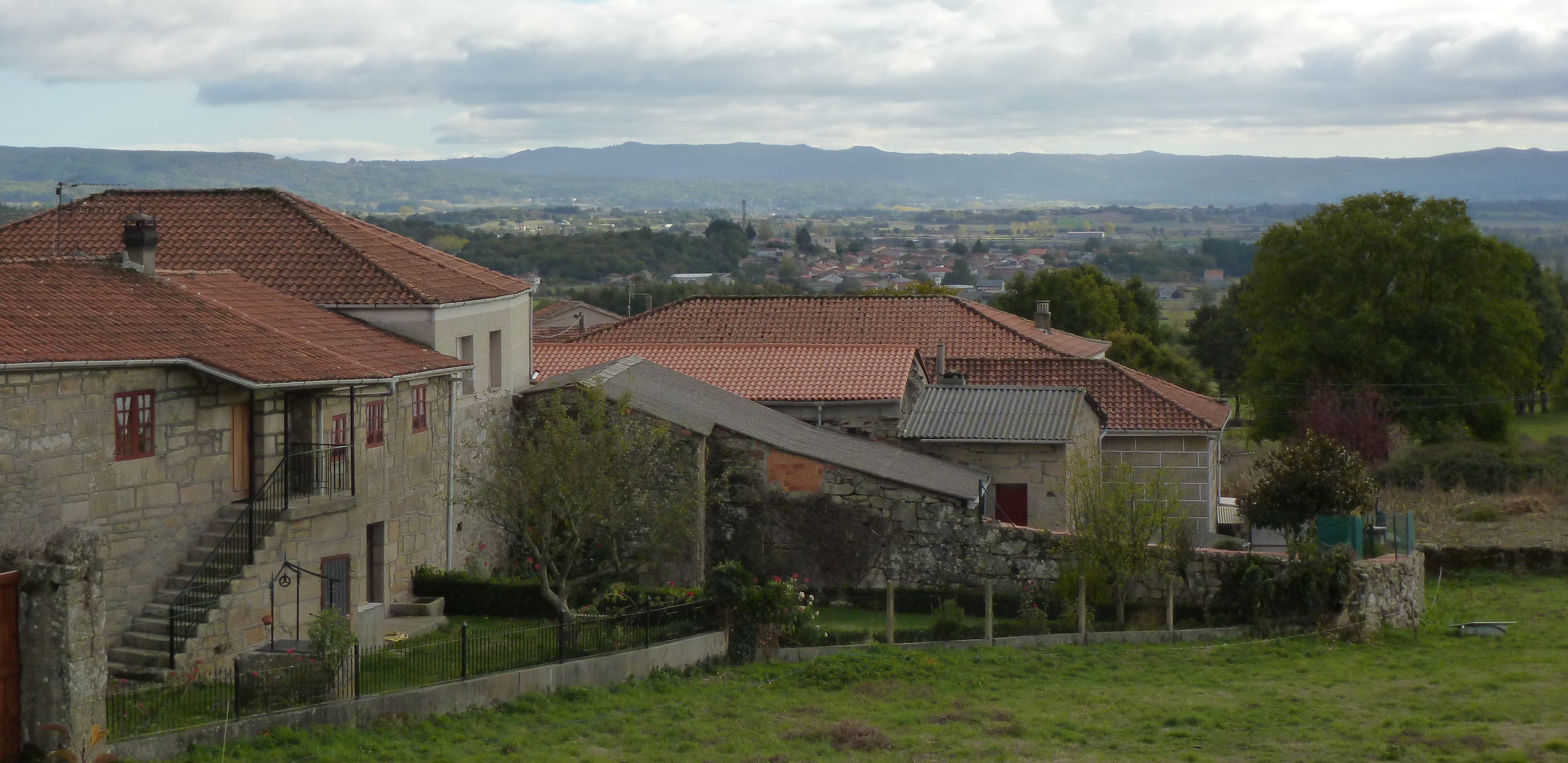 Padroso, Sarreaus